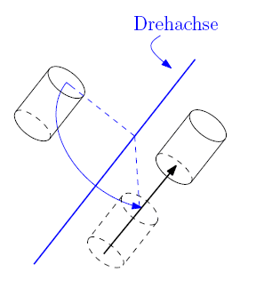 Schraubung